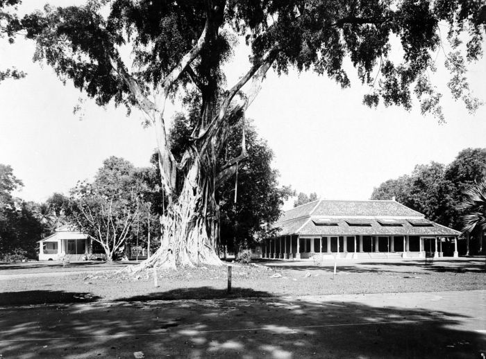 Repronegatief. Een waringin op het terrein van de HBS Koning Willem III te Weltevreden, Batavia